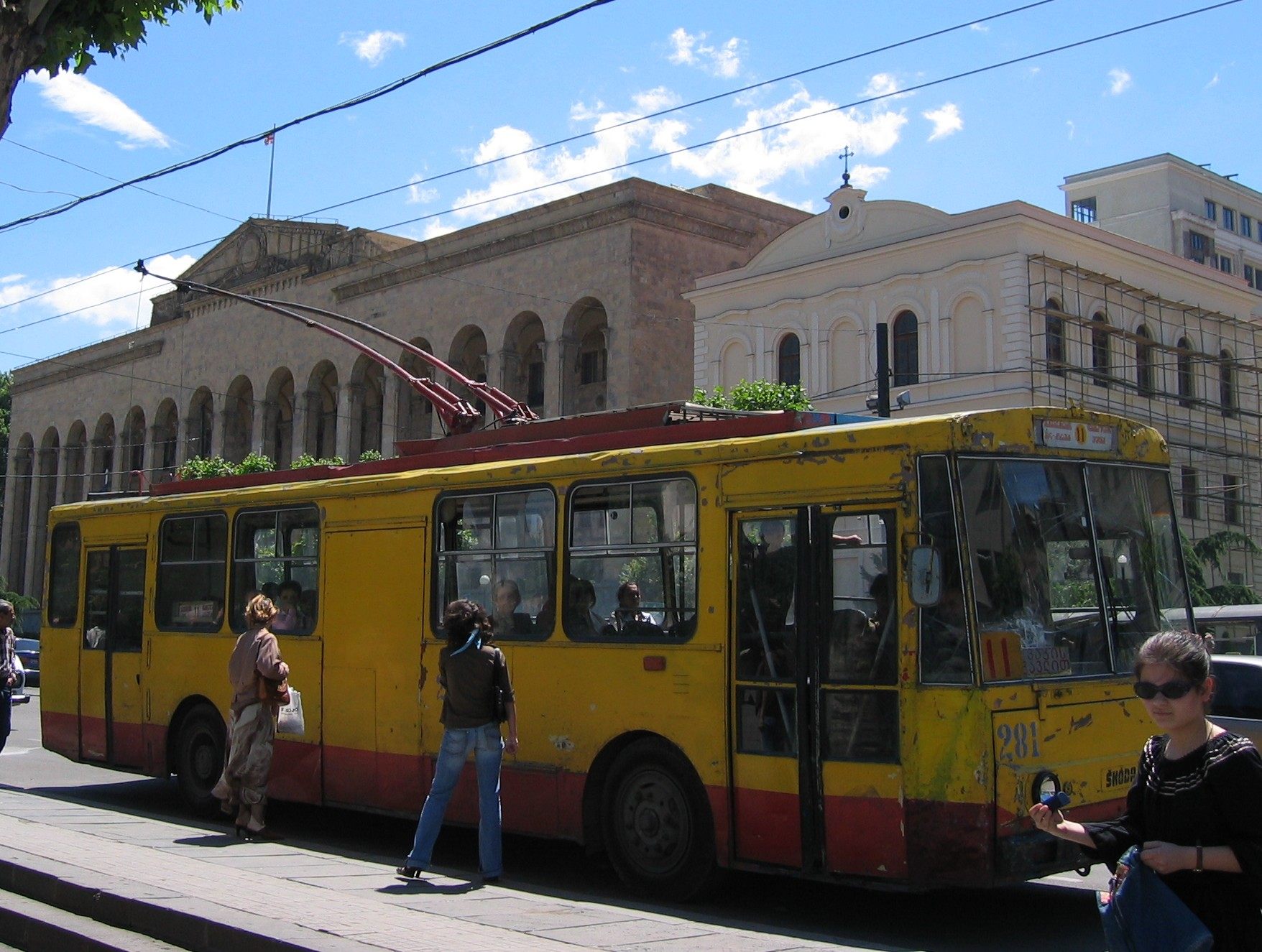 Användare bosatt i Kalmar född 1974. Gör, när tid ges, alltifrån smärre justeringar till mer övergripnade förändringar på områden han tycker sig behärska. Även nytillskott förkommer. Har förkärlek för östra Europa då han känner sig berest här och ibland finner felaktigheter i befintliga artiklar. Har inte skapat några riktiga juveler, men framhåller i brist på annat artikeln Sotji som han har skapat som både inloggad och anonym använare. Ojj! 600 har också bjudit på några av sina bilder tagna på resande fot.